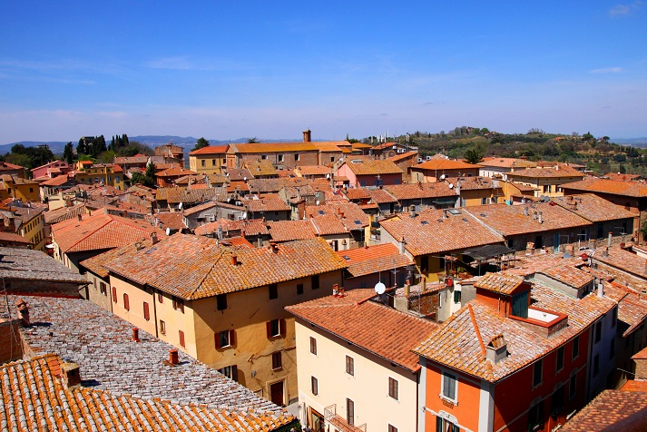 Panorama di Chiusi